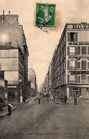 Rue Philippe de Girard, Paris, vers 1900